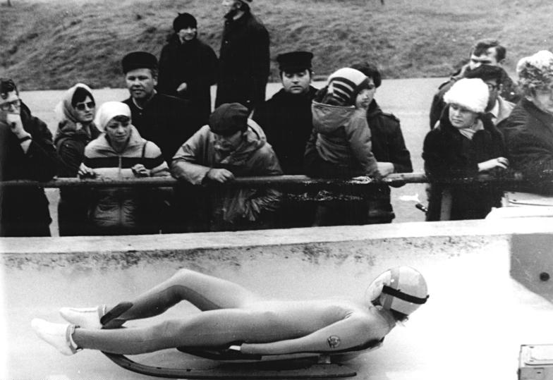 Steffi Martin ADN-ZB Schaar 6.2.1983-USA: Weltmeisterschaften im Rennschlittensport-Bei den Welttitelkämpfen auf der Olympiabahn von Lake Placid hat sich am 5.2. (Ortszeit) nach drei von vier Läufen die DDR-Starterin Steffi Martin (Foto von einem früheren Wettkampf) klar an die Spitze gesetzt.